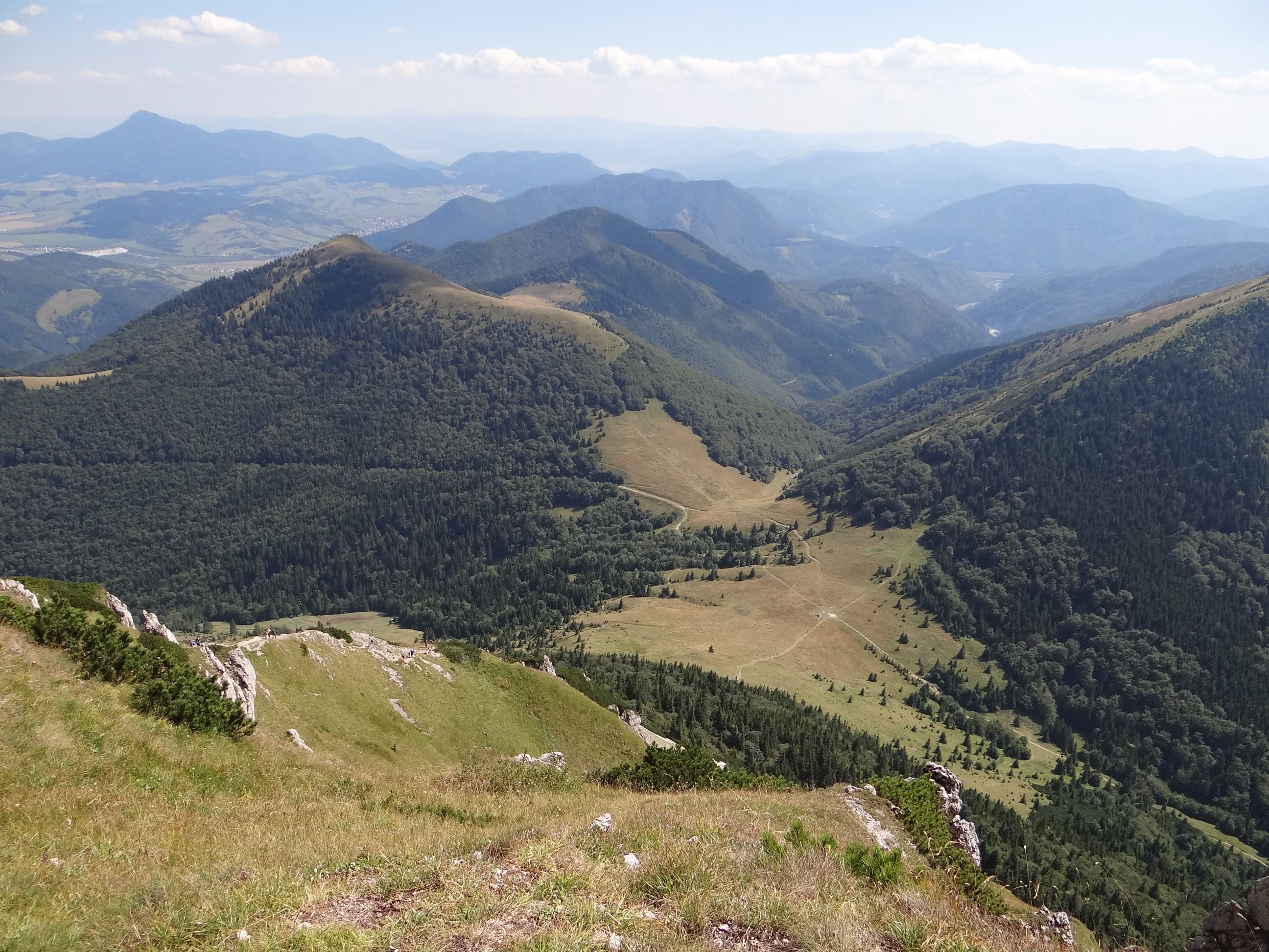 iew from Veľký Rozsutec: Osnica, Medziholie, Stoh